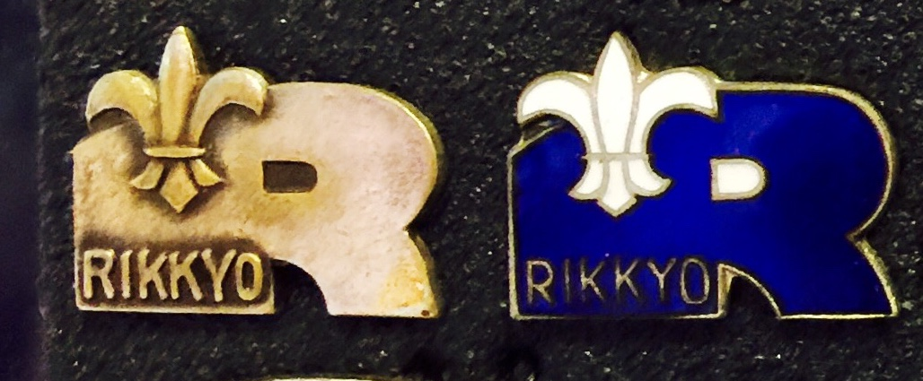 立教 ユリの紋章 昭和後期